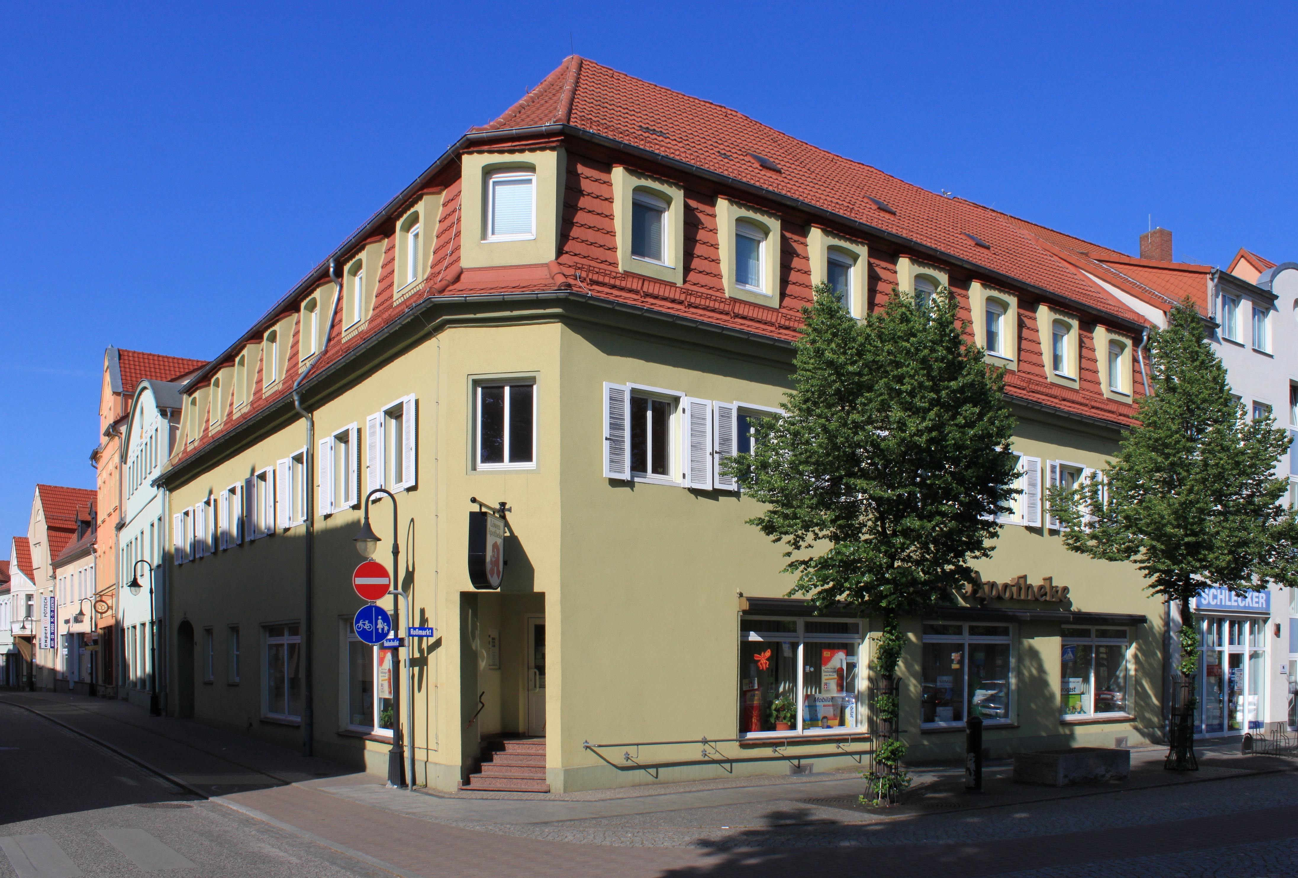 Löwen-Apotheke in Bad Liebenwerda. Inhaber Phr. Dr. h.c. Wolfgang Liebe, Träger des Bundesverdienstkreuzes am Band.